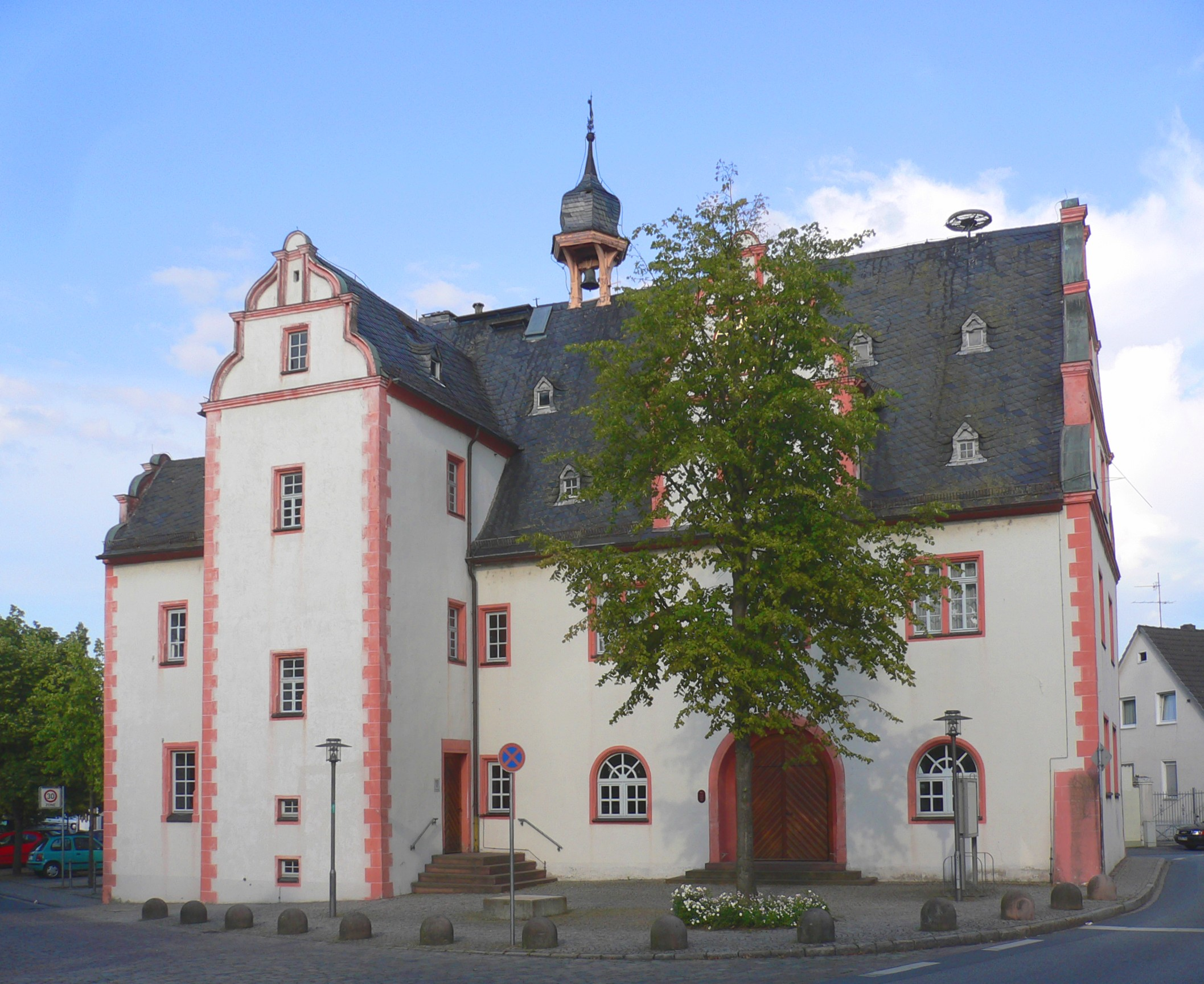 Das historische Pfungstädter Rathaus